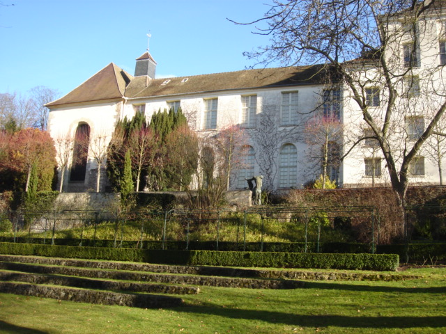 Ancien hôpital de saint-Germain, doté par Mme de Maintenon, à saint-Germain-en-Laye. Acruellemant ancienne maison, et musée Maurice Denis. École Nabis.